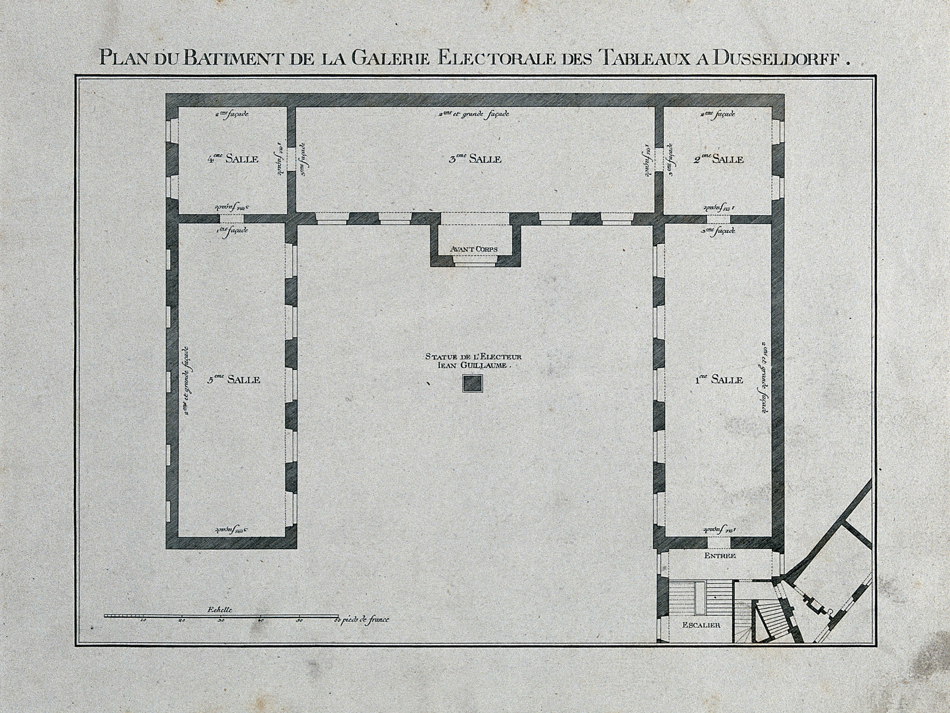 Plan du batiment de la galerie électorale des tableaux à Dusseldorf statue de l'Electeur Jean Guillaume